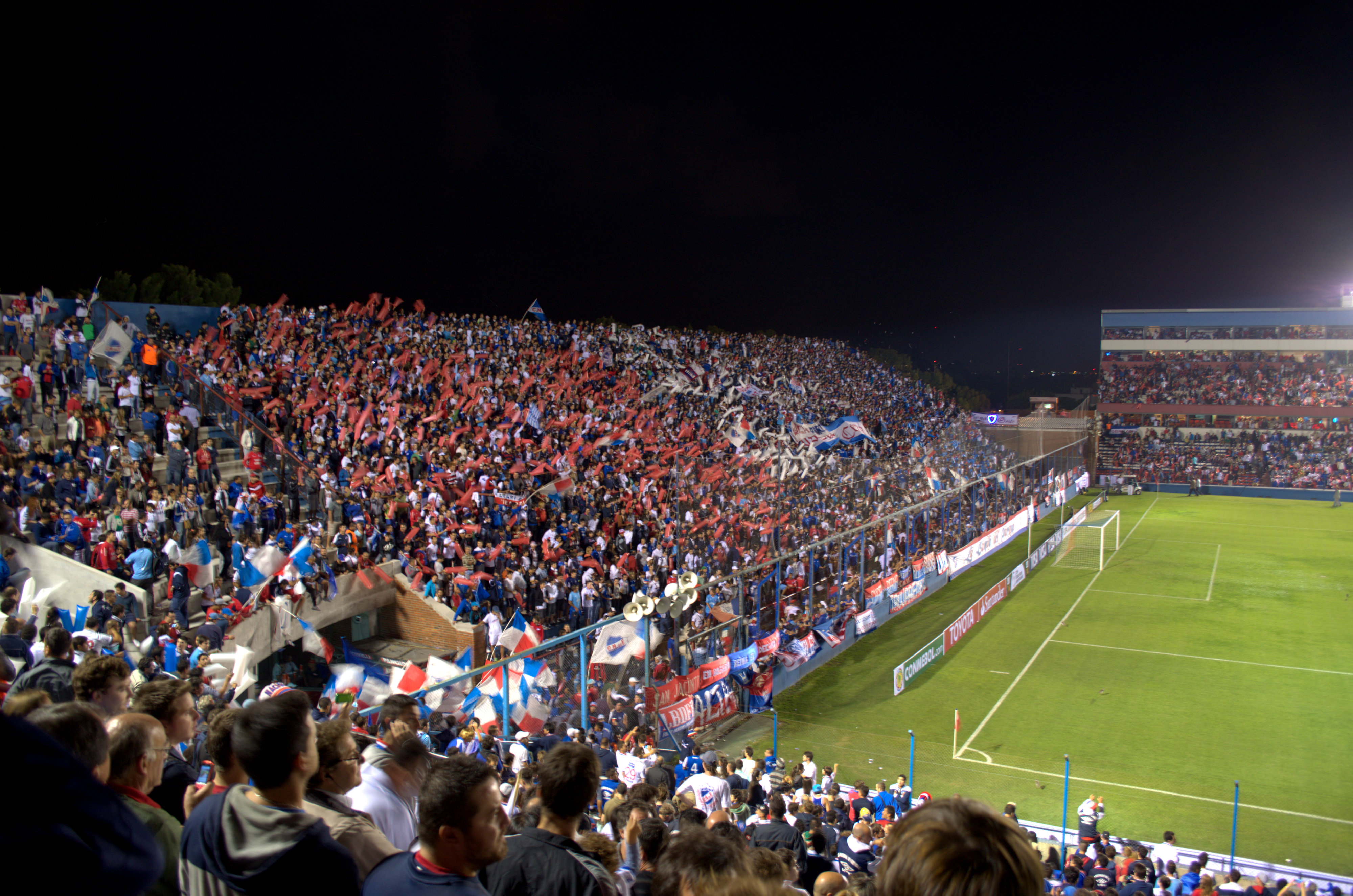 Imagen previa al encuentro entre Nacional y Gremio, a disputarse en el estadio Gran Parque Central por la Copa Libertadores 2014.